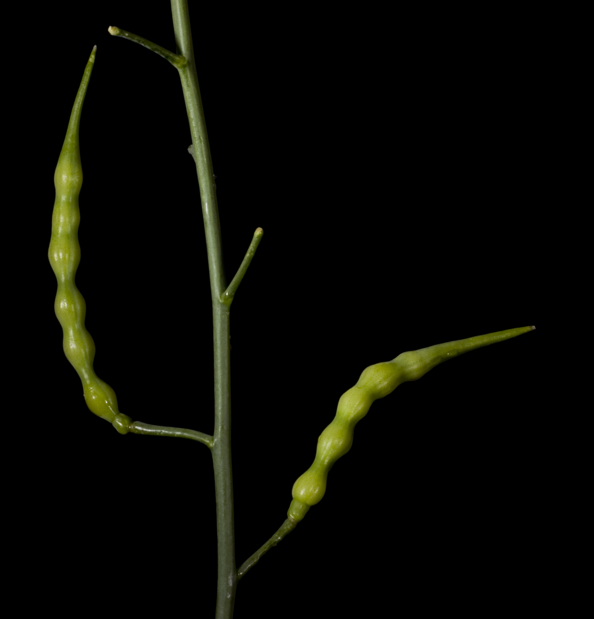 KRT3218